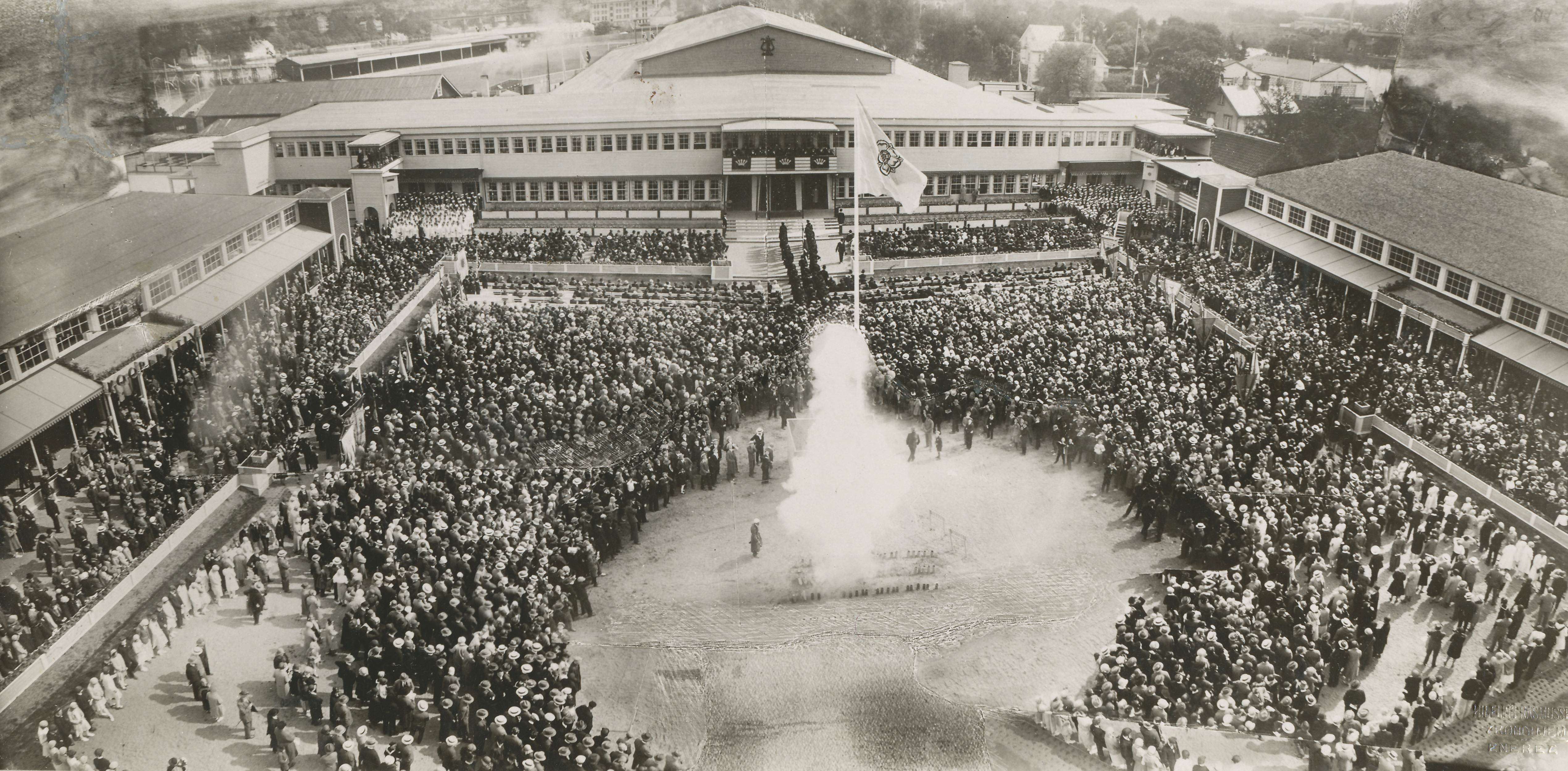 Trøndelagsutstillingen 1930. Fra åpningen av utstillingen. Fotograf: Hilfling-Rasmussen. Om fotografen: HILFLING-RASMUSSEN, JENS CARL FREDERIK - Christiania, Storthingsgade 14 (og 16) 1896/98 - 1910, Trondhjem, Søndre Gade 1910 - 41. f. på Fyen 14.10.1869 - d. 27.12.1941, sønn av fotograf Jens Rasmussen (ca. 1841 - ), begynte som læregutt hos faren i Assens. Kom til København i 1893, bestyrte forskjellige forretninger der og begynte egen forretning ca. 1894. Giftet seg samme år. 5.6.1896 kom han til Christiania som operatør hos Borgen og overtok i 1898 Axel Leverins firma, averterte i 1899 at han leverte avtrykk av Leverins plater. Han hadde enerett på fotografering av begivenhetene i 1905 på nært hold, som f. eks. Kong Haakons ankomst, og var med på Kroningsferden i 1906 som fotograf. Drev også kunstforlag. Fra 1907 var han en tid sammen med Ernest Rude i firmaet "Rude & Hilfling", men overlot dette i 1910 til Rude og reiste til Trondhjem. Her startet han atelier i Søndre Gade og var lærer ved fotografskolen ved Trondhjems Fagskole. Diverse medaljer i gull og sølv. Ble i 1934 æresmedlem av Nordenfjeldske Fotografers Kreds, som han var en av stifterne av og i 1937 æresmedlem av Norges Fotografforbund. Firmaet ble i 1943 overtatt av sønnen Skjold, som senere gikk i kompaniskap med Thor Melhuus og dannet A/S. Melhuus gikk ut av firmaet etter kort tid, og det opphørte før 1968. Arkiv fra ca. 1910 - 58 i VSB [Det kongelige norske videnskabers selskabs bibliotek]. Hentet fra Bonge, Susanne: Eldre norske fotografer. Fotografer og amatørfotografer i Norge frem til 1920 (Universitetsbiblioteket i Bergen)